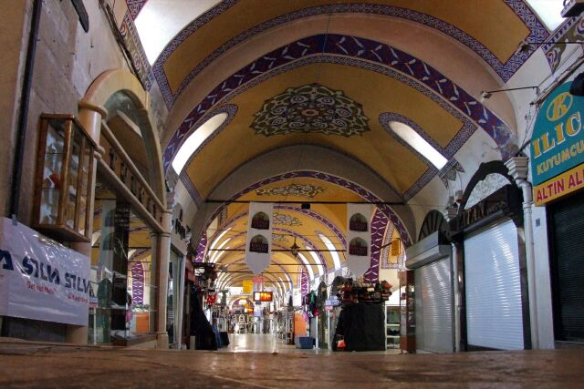 Grand Bazaar